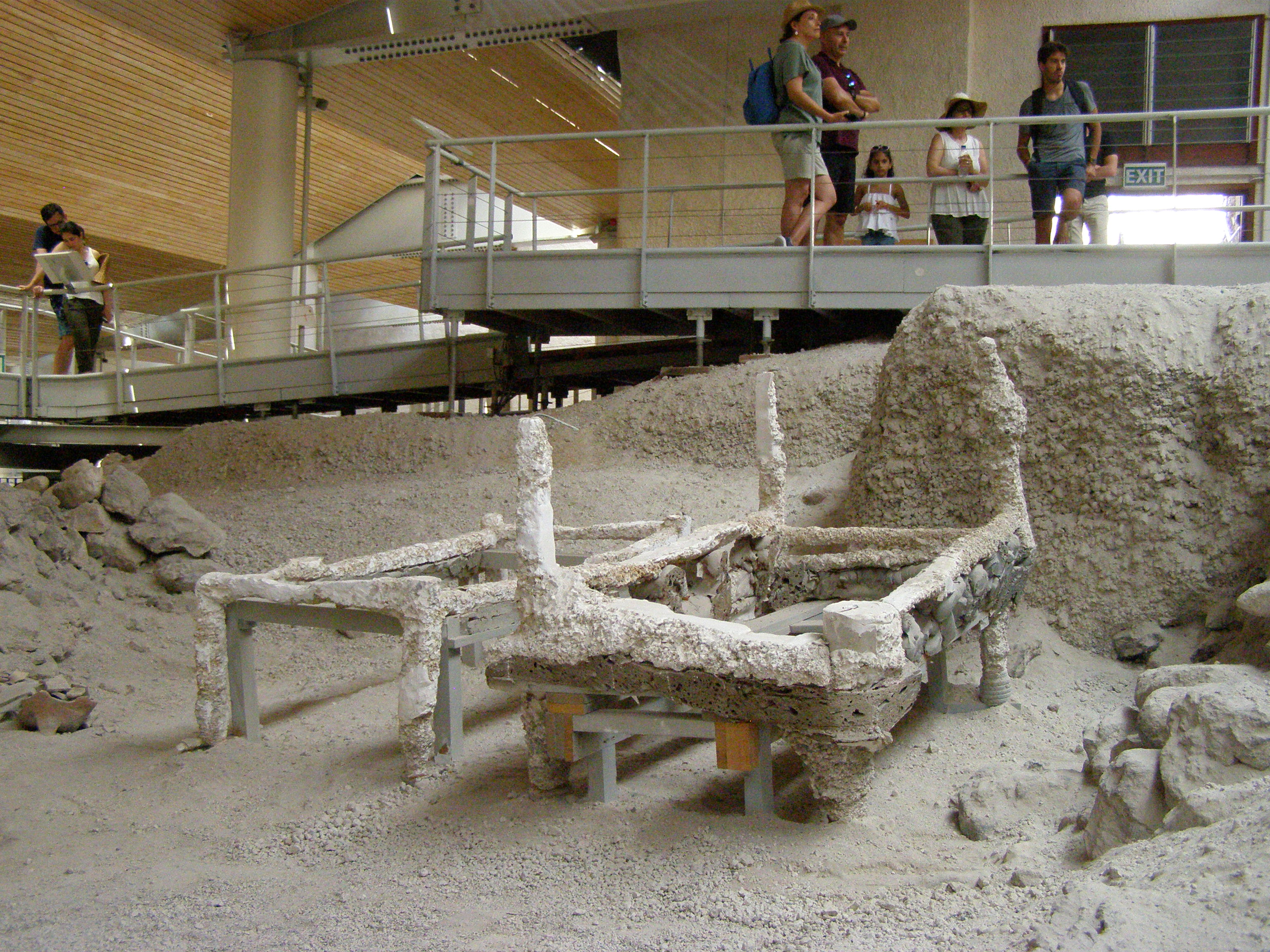 Připravený transport nábytku.